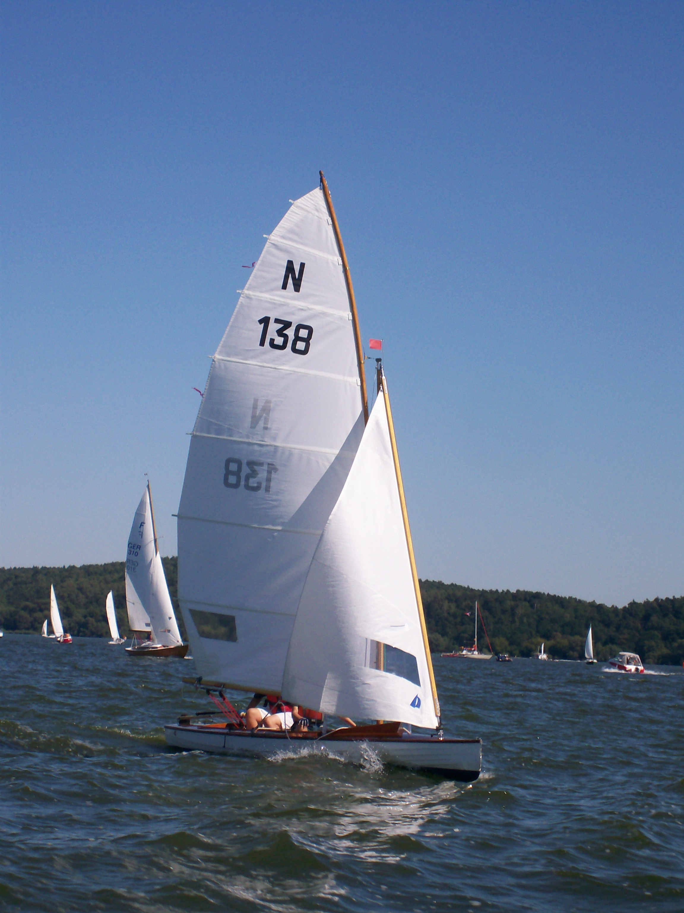 10qm Rennjolle CIRCE Bj 1925 in Berlin 2008